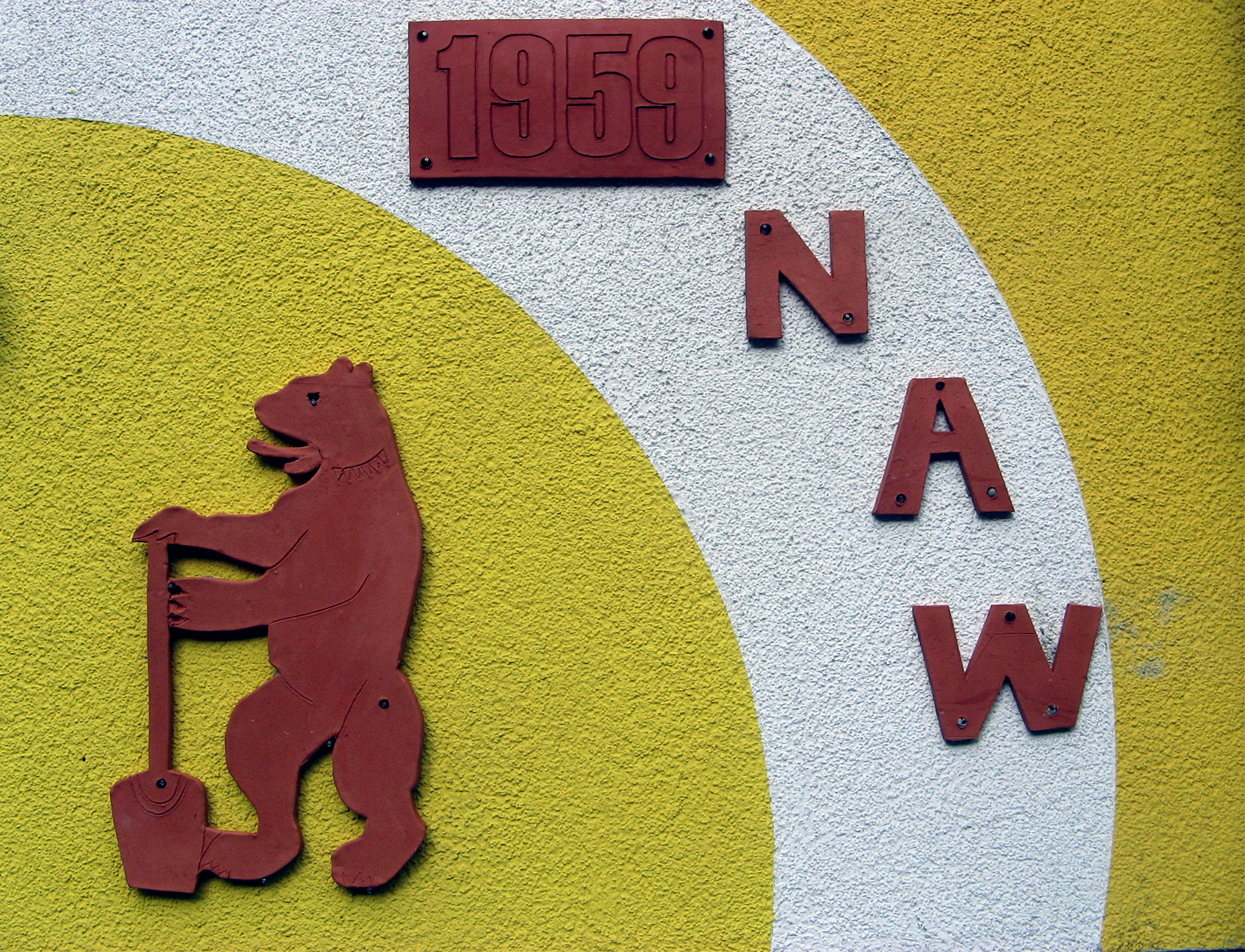 Am Regenbogenhaus (Kadiner Straße 9) in Friedrichshain wurde während des Festes zur 50-Jahrfeier der Grundsteinlegung des Hauses eine Keramik enthüllt, die an die frühere Fassadengestaltung mit dem NAW-Symbol, dem Bär mit dem Spaten, und der Jahreszahl 1959 (Jahr der Grundsteinlegung) unter den Buchstaben NAW erinnert. Diese Symbole verschwanden 2006, weil an der Ostfassade 4 neue große Fenster eingesetzt wurden, die den neuen Freizeiträumen der Jugendfreizeiteinrichtung Regenbogenhaus im Erdgeschoss und der Einrichtung für Mädchen und junge Frauen Phantalisa im Obergeschoss mehr Licht und mehr Aufenthaltsqualität gaben.